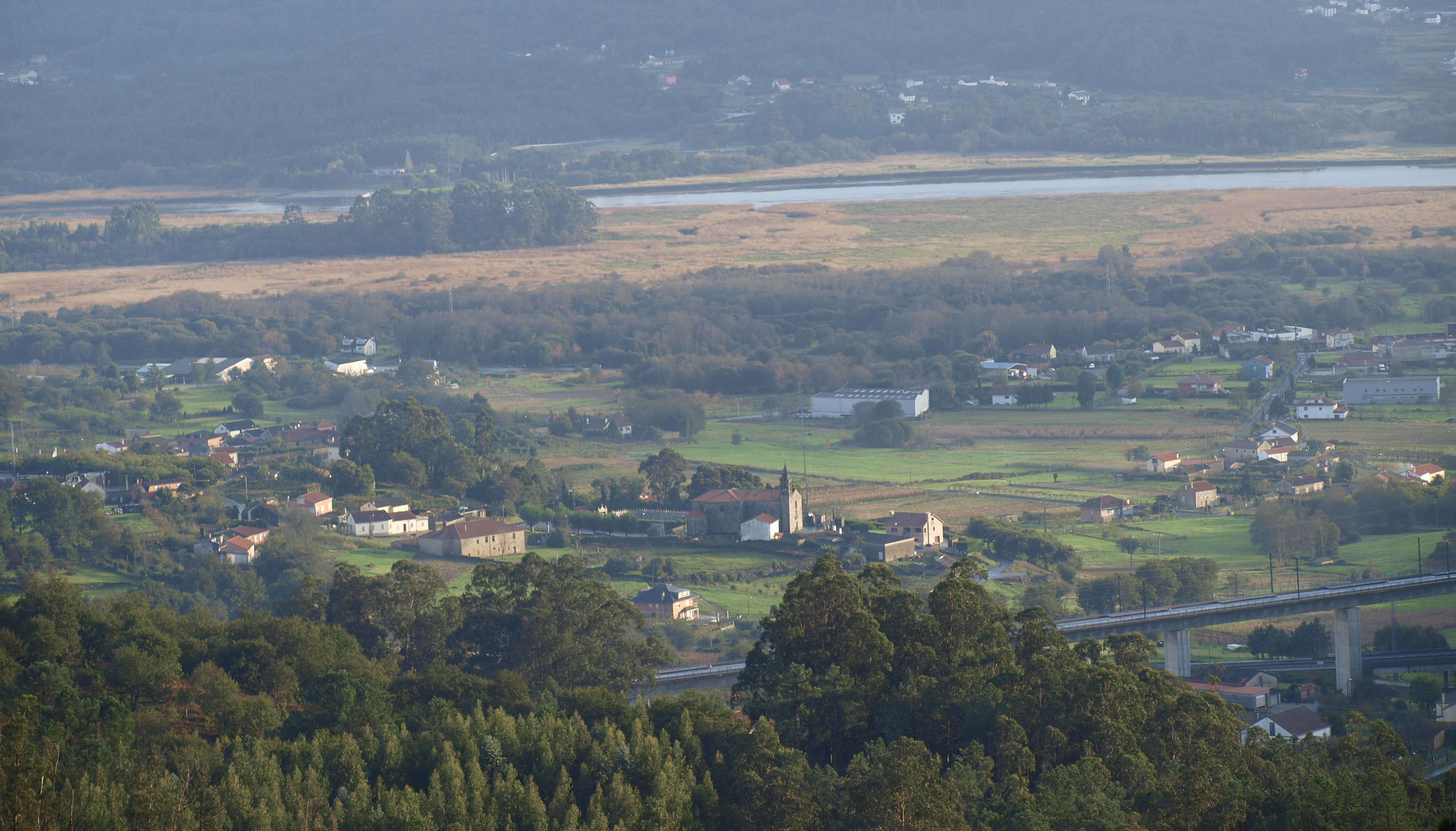 Panorámica de Laíño co río Ulla e as brañas ó fondo, vista dende o monte Caldebarcas, concello de Dodro.